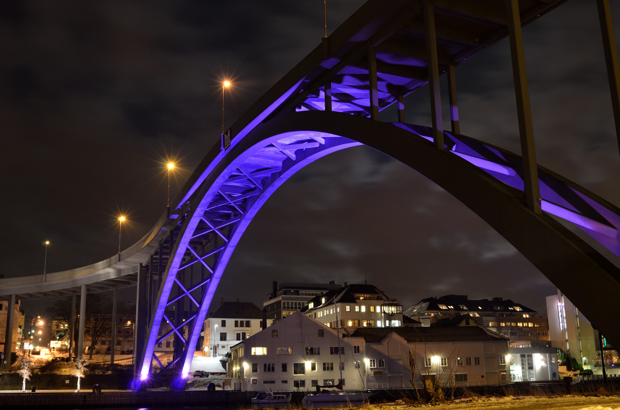 Risøybrua sett fra Risøy